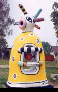 Betonplastik von Birgit Schöne für das Lügenmuseum Reinhard Zabka Sonstiges: Rechte an Reinhard Zabka übertragen, Bildspende im Jun. 2005